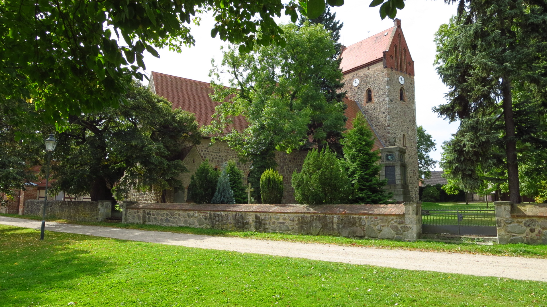 Blumberger Kirche, Nr. 8 in der Liste der Baudenkmale in Blumberg bei Ahrensfelde